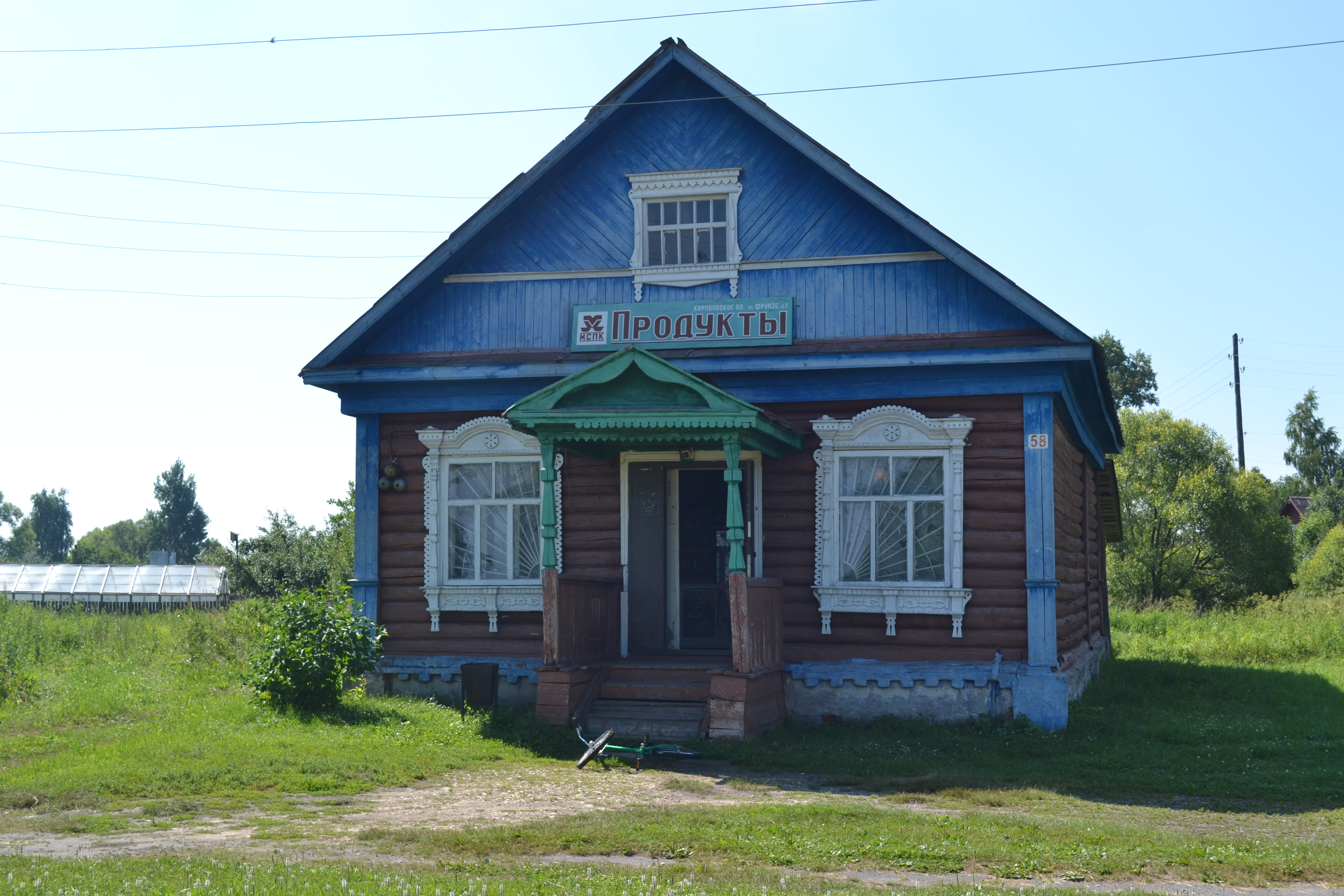 Магазин в деревне Лека (Шатурский район)